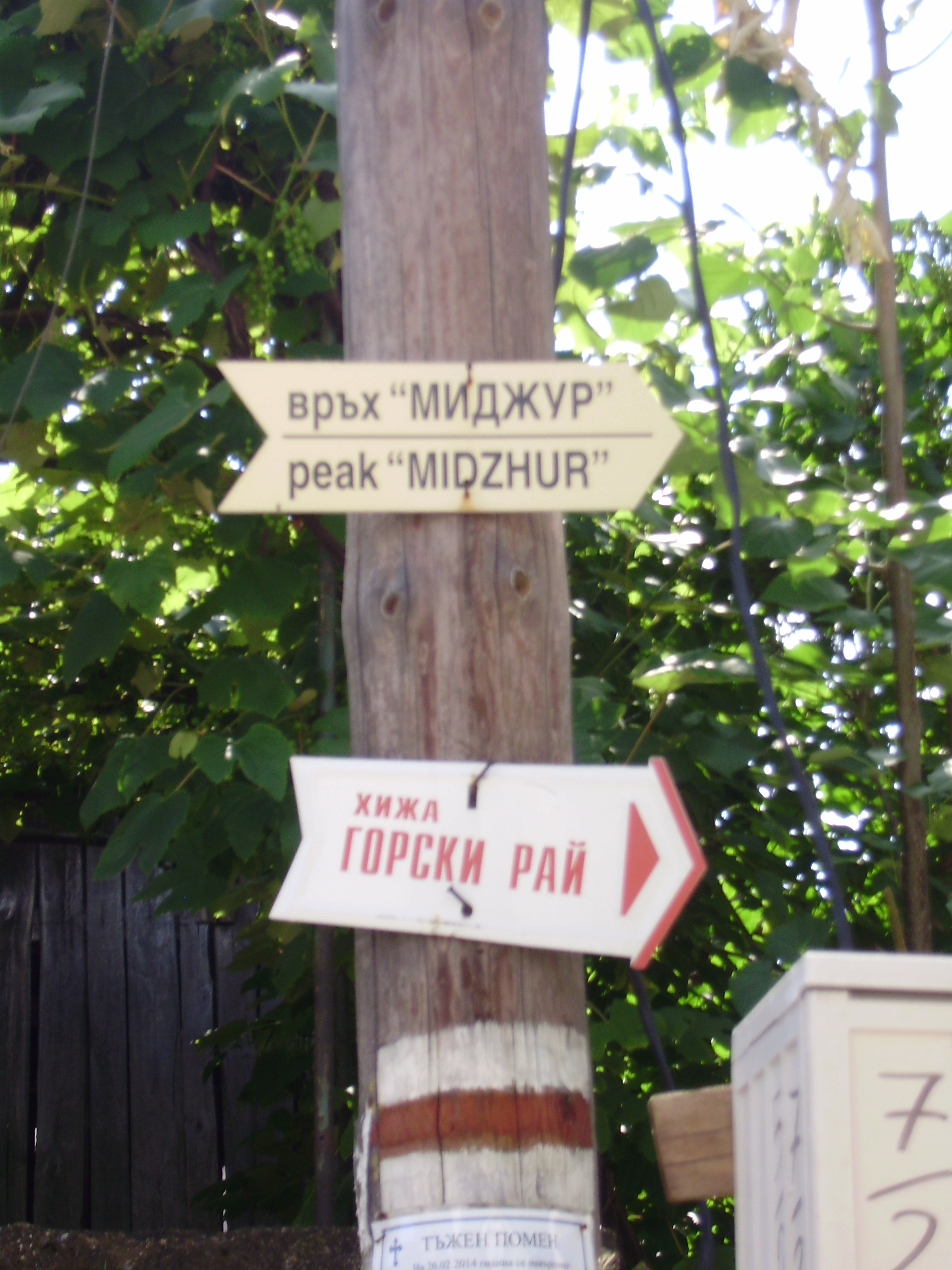 Туристически табели в село Чупрене, указващи пътя към връх Миджур и хижа Горски рай.